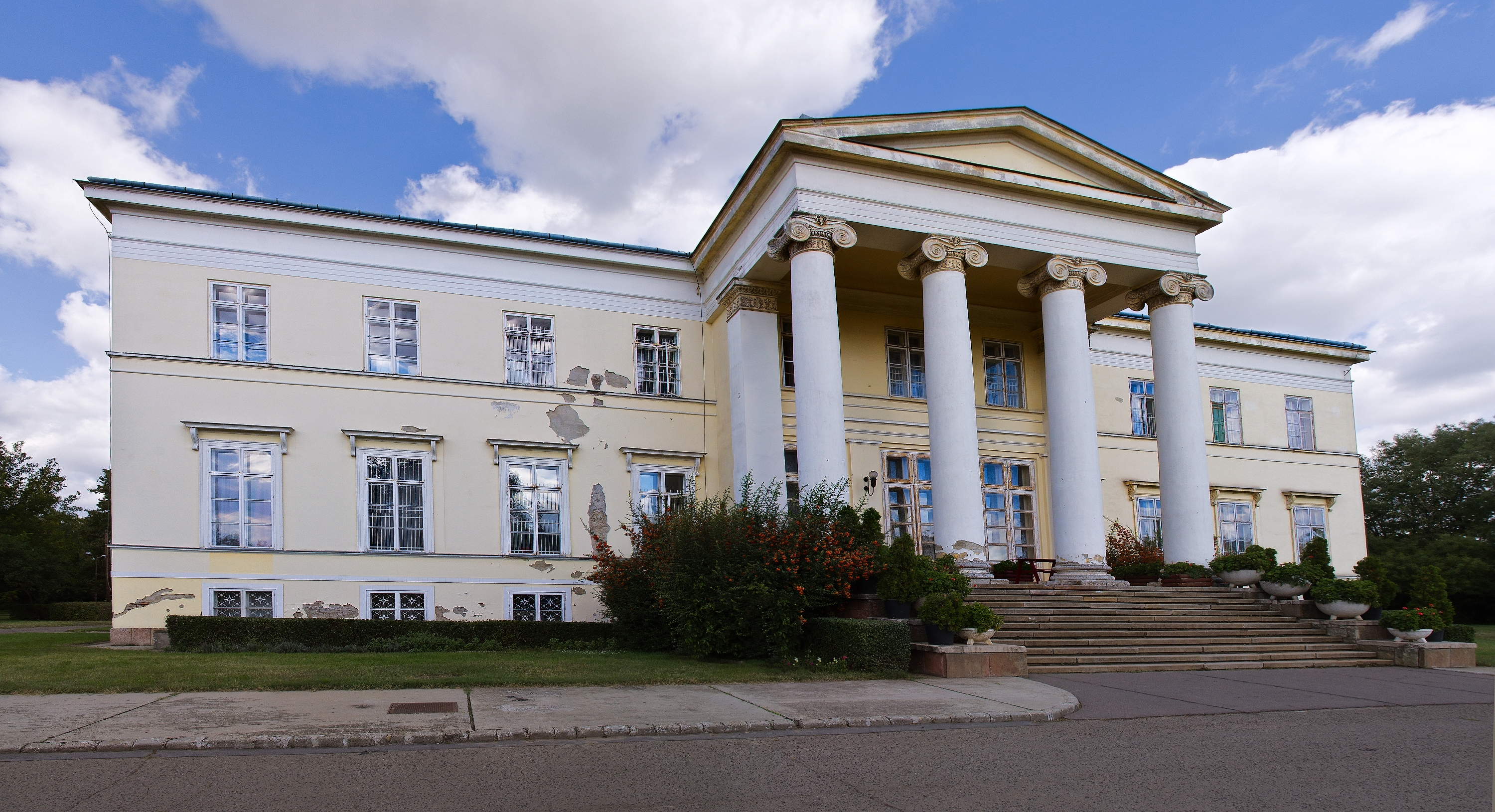 Teleki-kastély This is a photo of a monument in Hungary. Identifier: 7072